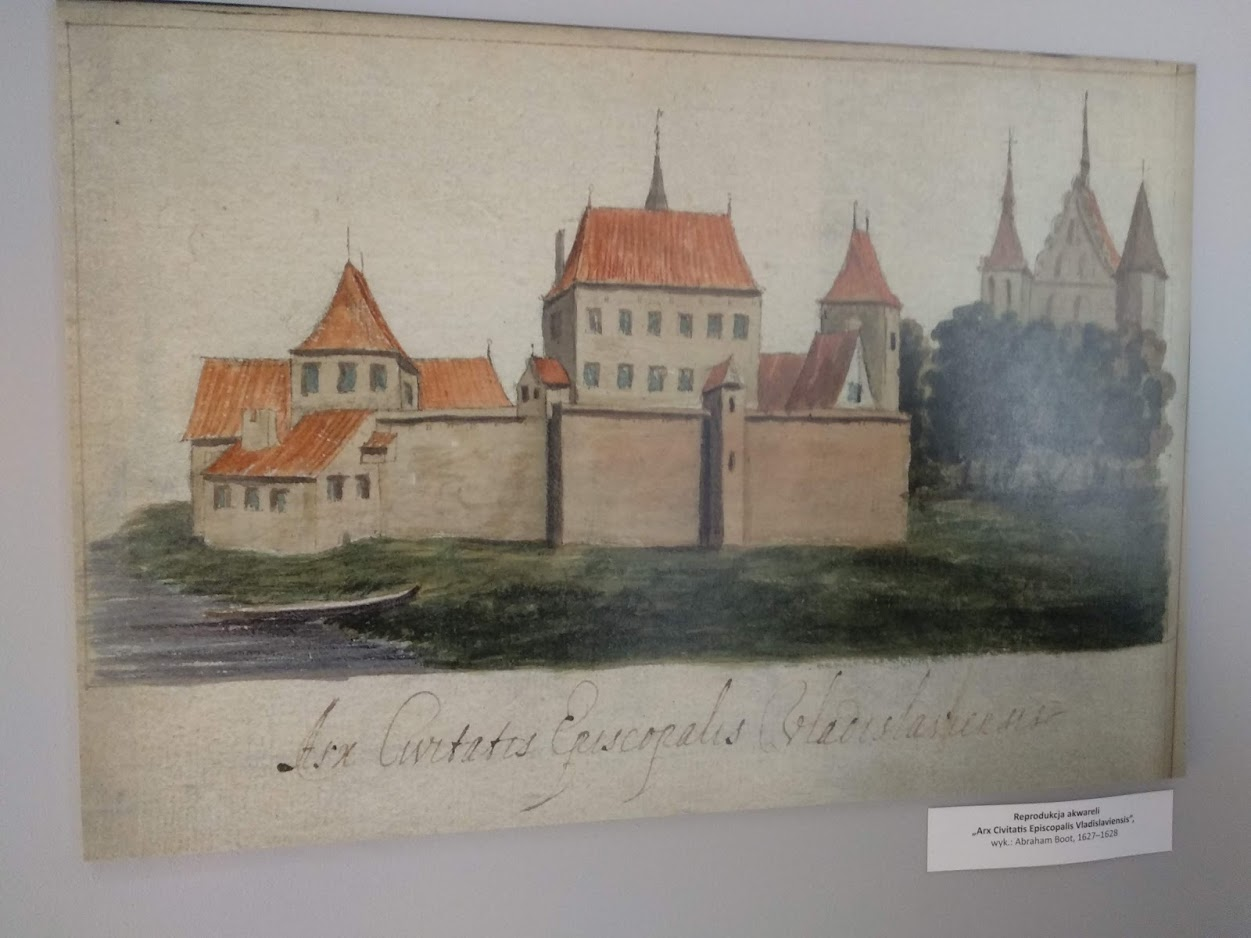 Muzeum Historii Włocławka (2019 r.)